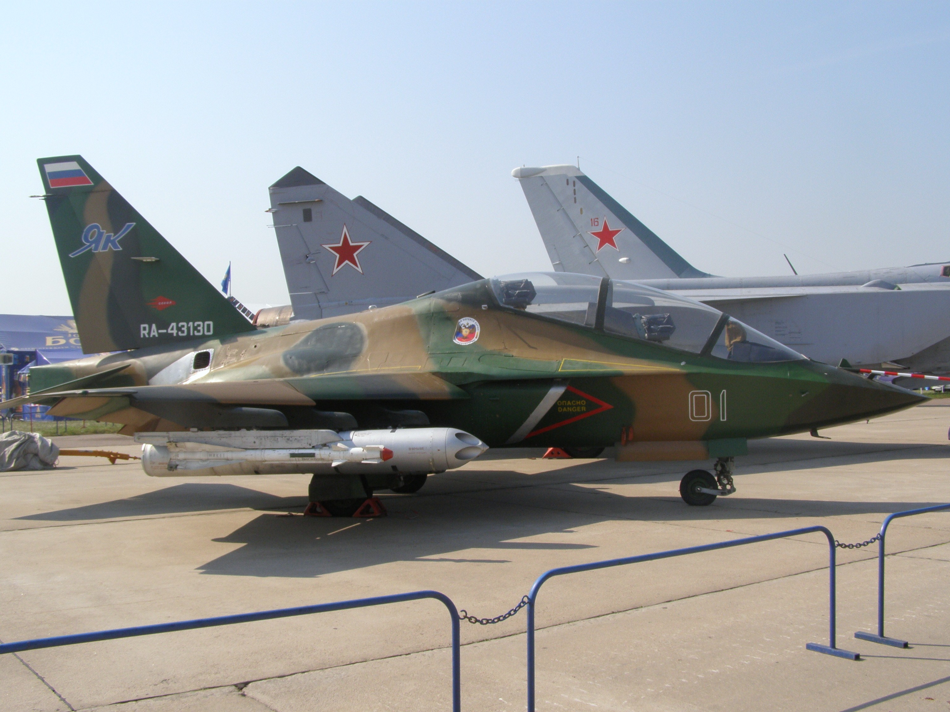 Yak-130 military trainer (RA-43130)